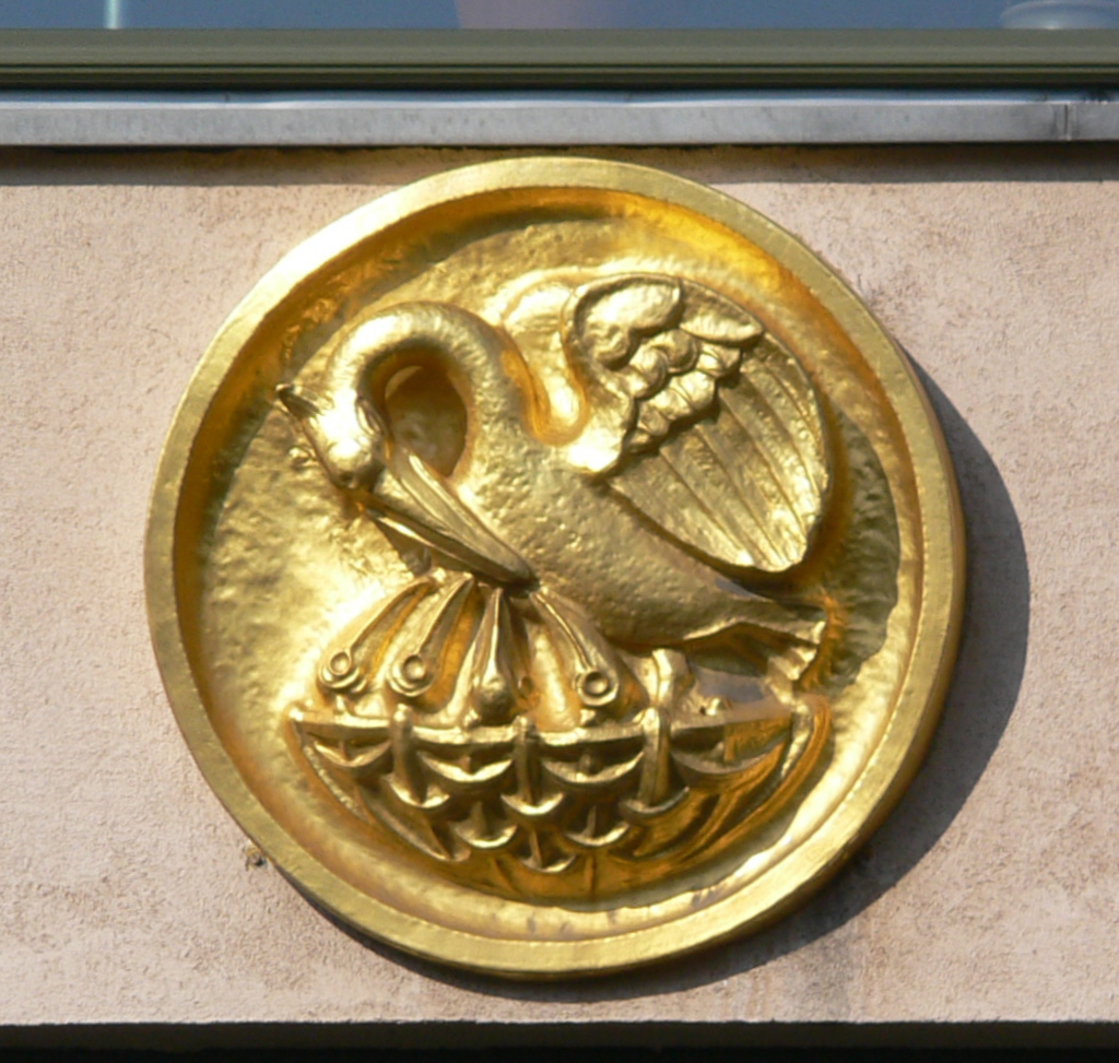 Berlin-Kreuzberg, Ritterstraße Pelikanhaus, Ritterstr. 9/10, Relief